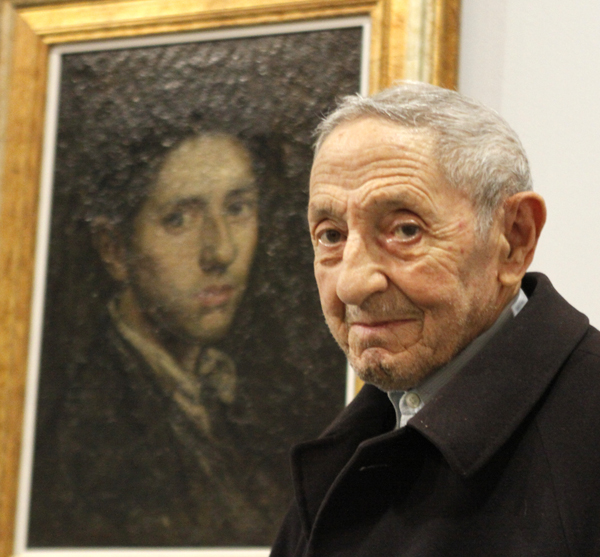 Isaac Díaz Pardo delante de su autorretrato, durante la preparación de su exposición en la Casa da Parra (Santiago de Compostela)